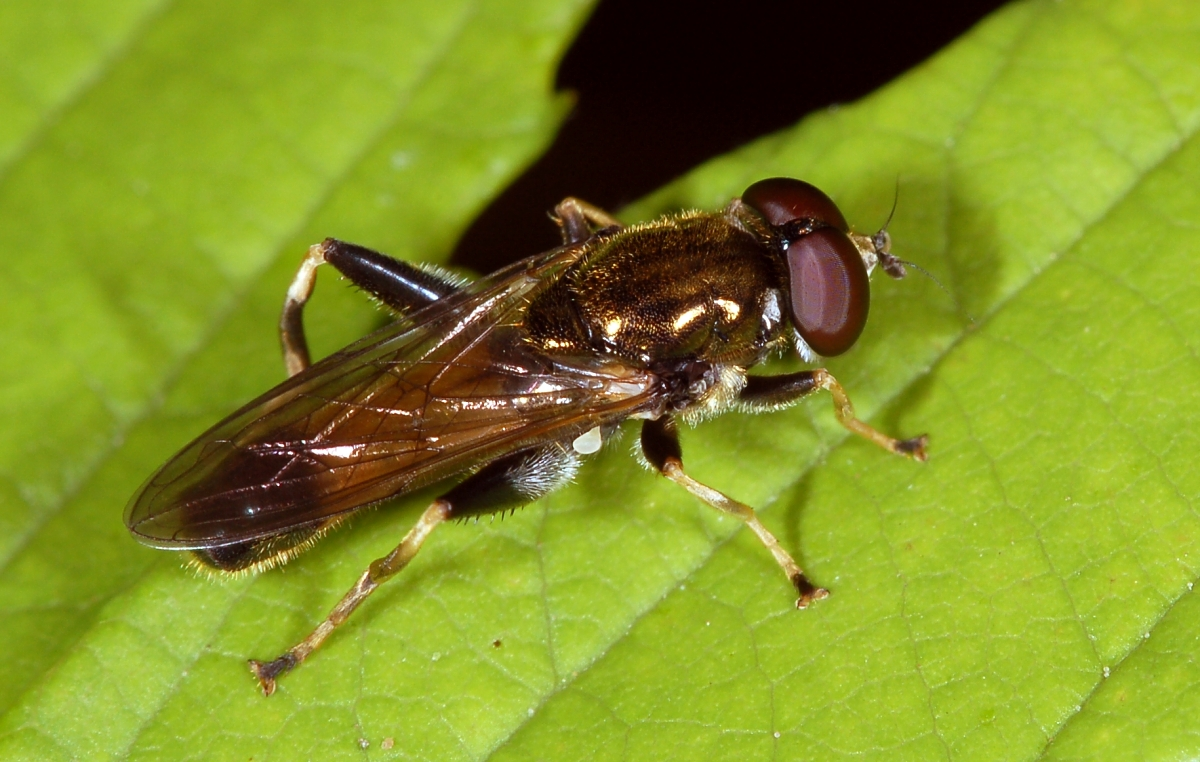 Syrphidae, Xylota spec., Knüllwald, Hessen, Deutschland